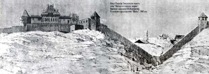 Подпись картинки: "В центре Гянджинские ворота, налево "Цитадель и Ханский дворец". Фрагмент эскиза В.В. Верещагина "Шабех" . 1865 г." Карабахский историк Мир Мехти Хазани пишет, что: “Панах Хан воздвиг себе дворец наподобие маленькой крепости со стенами и башнями “, а в 1768 г. рядом построил “красивый дворец” старшему сыну Ибрагим Хану. Согласно русским архивным материалам, существовало еще два замка. Одину восточного края крепости, другой – в северо-восточном углу. Позже на холме у Гянджинских ворот появляется внутри крепостная цитадель с комплексом оборонительных стен и башен. На территории цитадели разместились ханские дворцы. Назначение других сооружений цитадели не выяснено. Цитадель хорошо видна на рисунке В.В.Верещагина, сделанном в 1865 году.